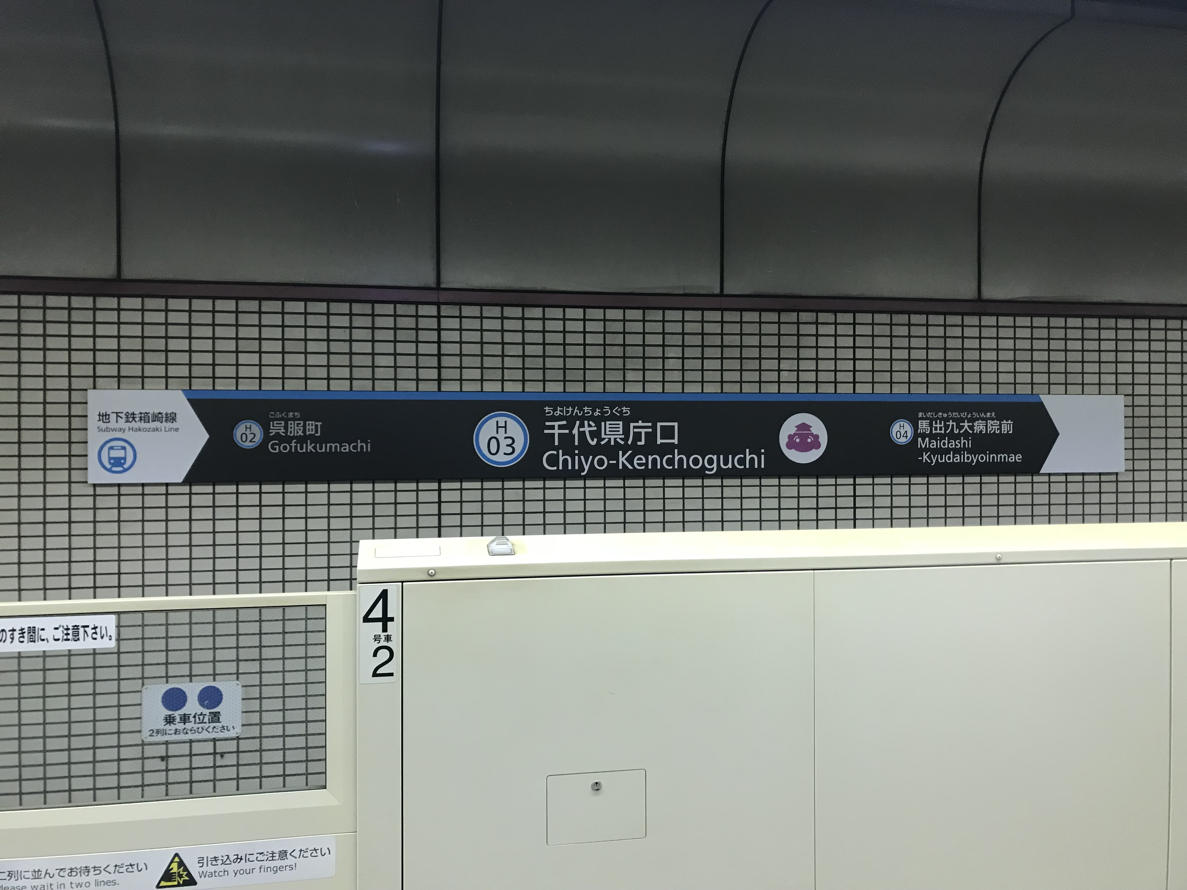 千代県庁口駅の駅名標。イラストは十日恵比須神社の恵比寿